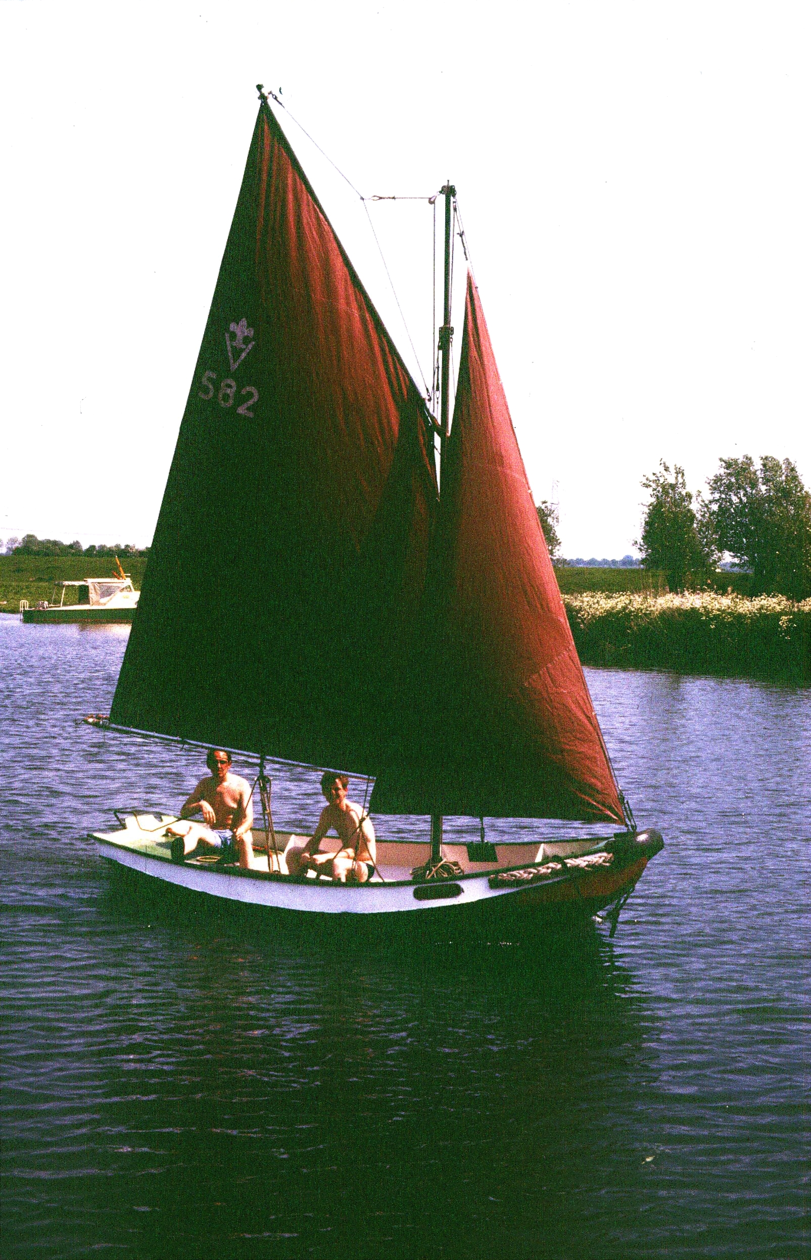 Lelievlet Stuntel V583 in de Brabantse Biesbosch